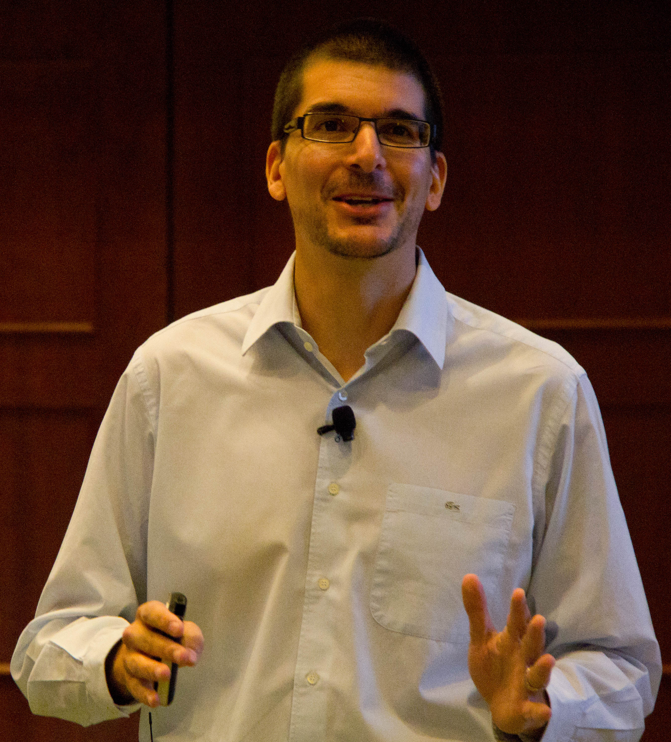 Александр Остервальдер